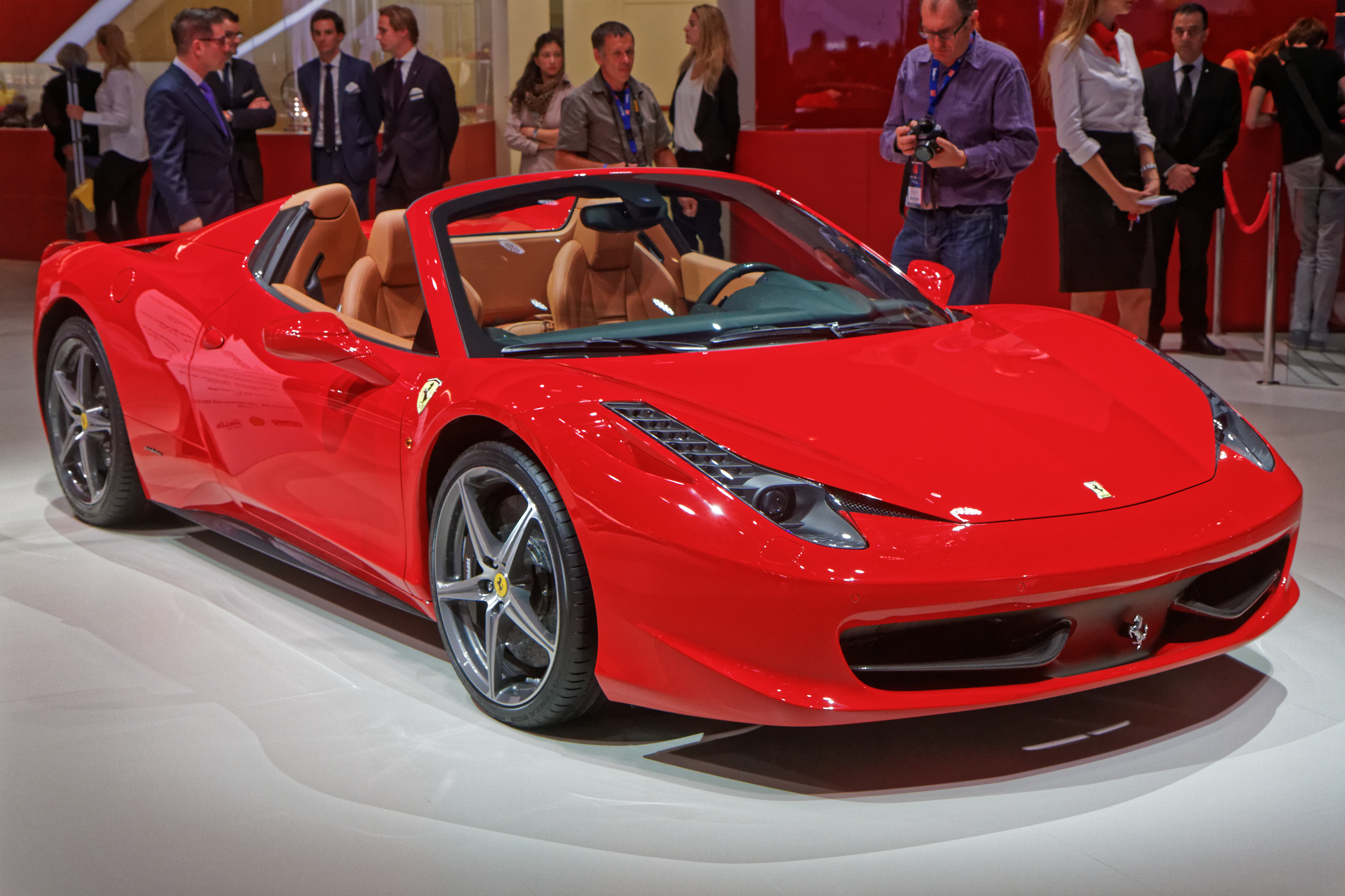 Une Ferrari 458 Spider présentée lors du mondial de l'automobile de Paris 2014.